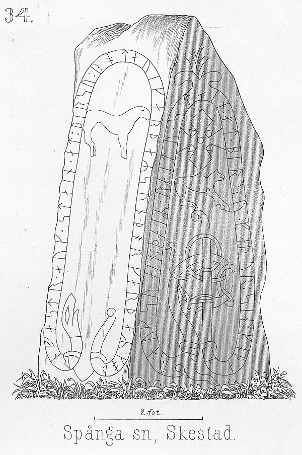 Runsten U 79. Skesta (Stockholms kn, Spånga sn). Avritning av Richard Dybeck (1811-1877). Ur Sverikes runurkunder / granskade och utgifne af Richard Dybeck.